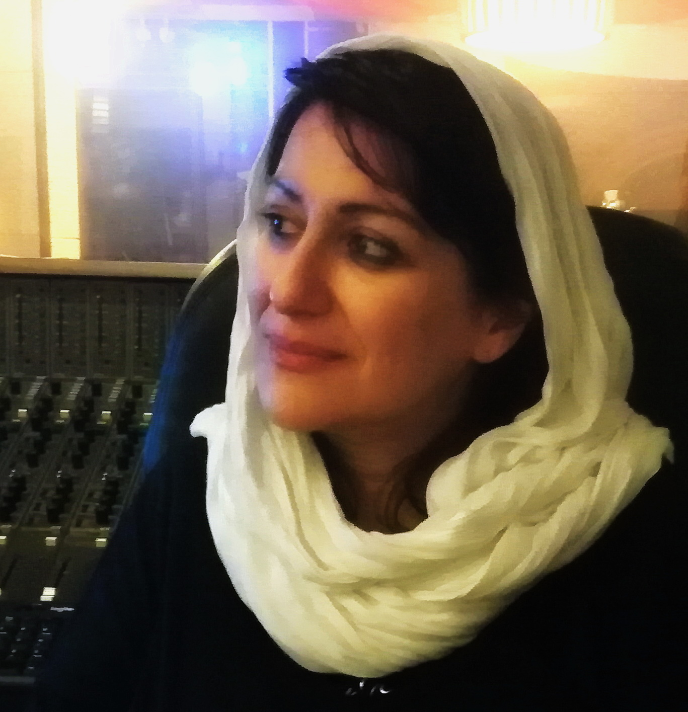 مریم ابراهیم پور استودیو صبا 1397